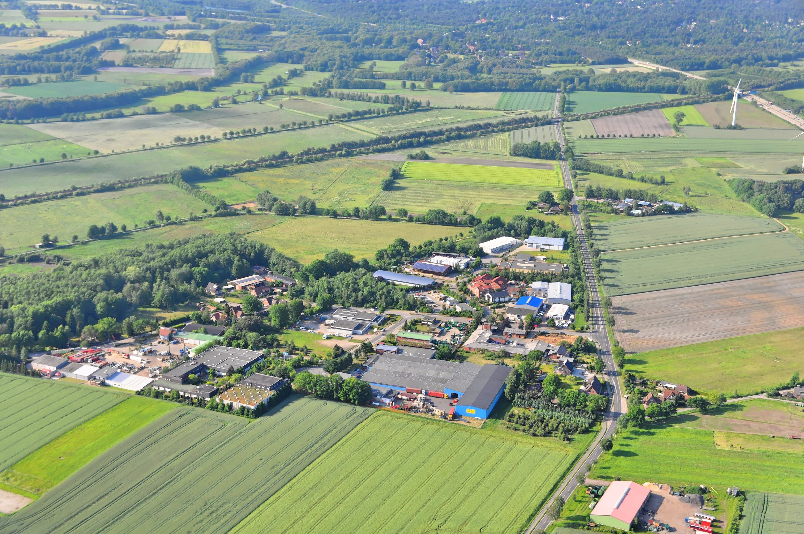 Überführungsflug vom Flugplatz Nordholz-Spieka über Lüneburg, Potsdam zum Flugplatz Schwarzheide-Schipkau